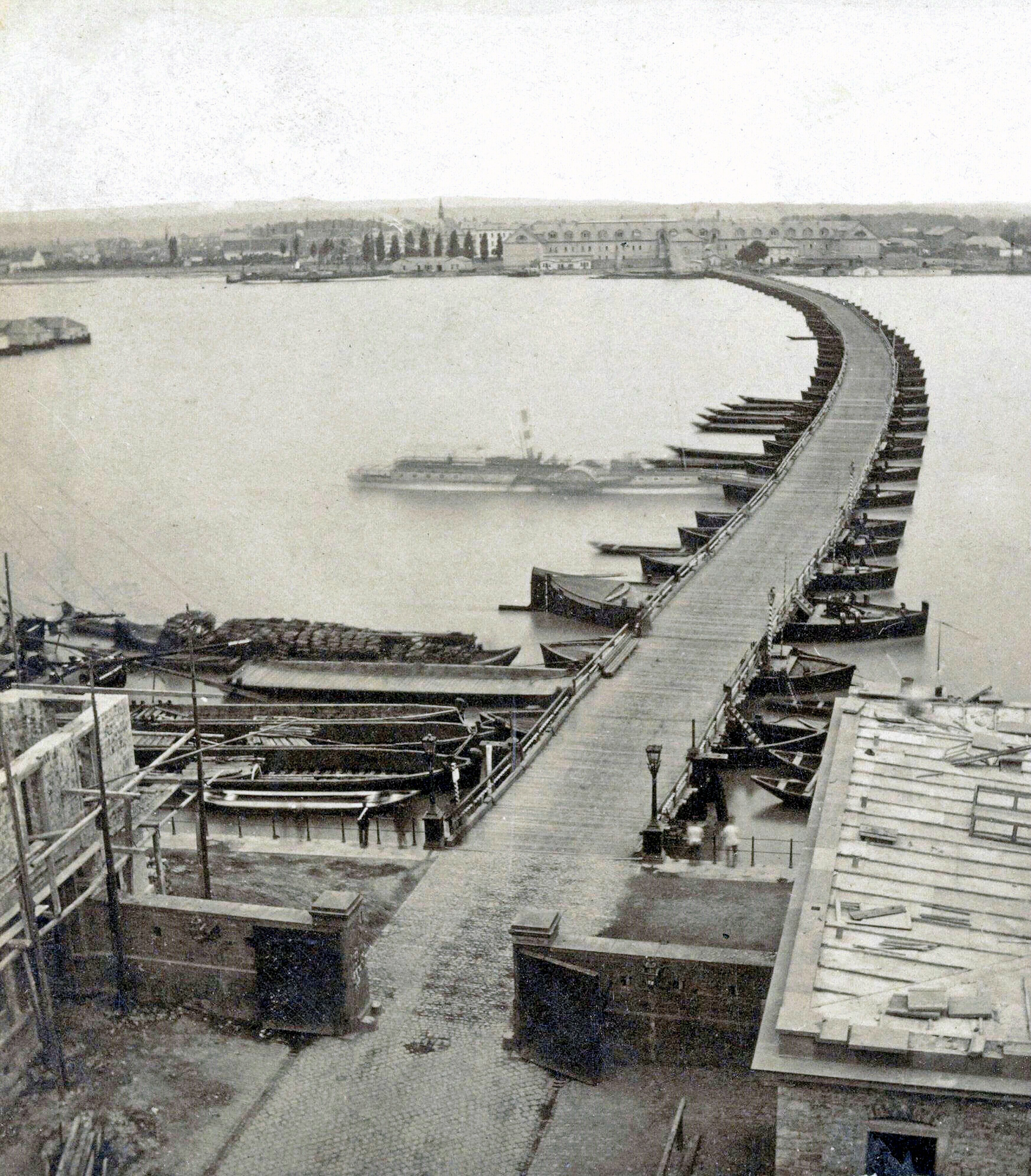 Die Mainzer Schiffsbrücke, um 1870, Blick nach Kastel.